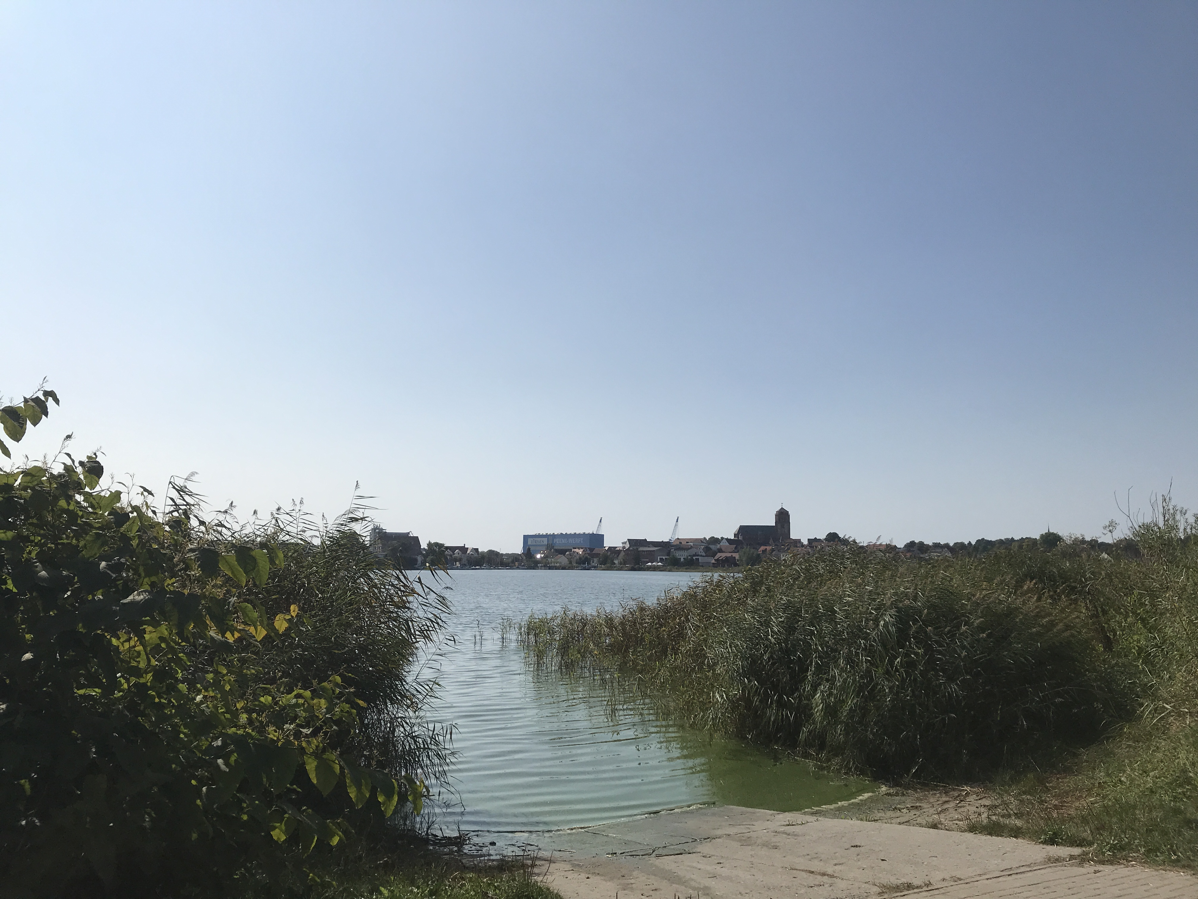 Dreilindengrund in Wolgast, Landkreis Vorpommern-Greifswald in Mecklenburg-Vorpommern